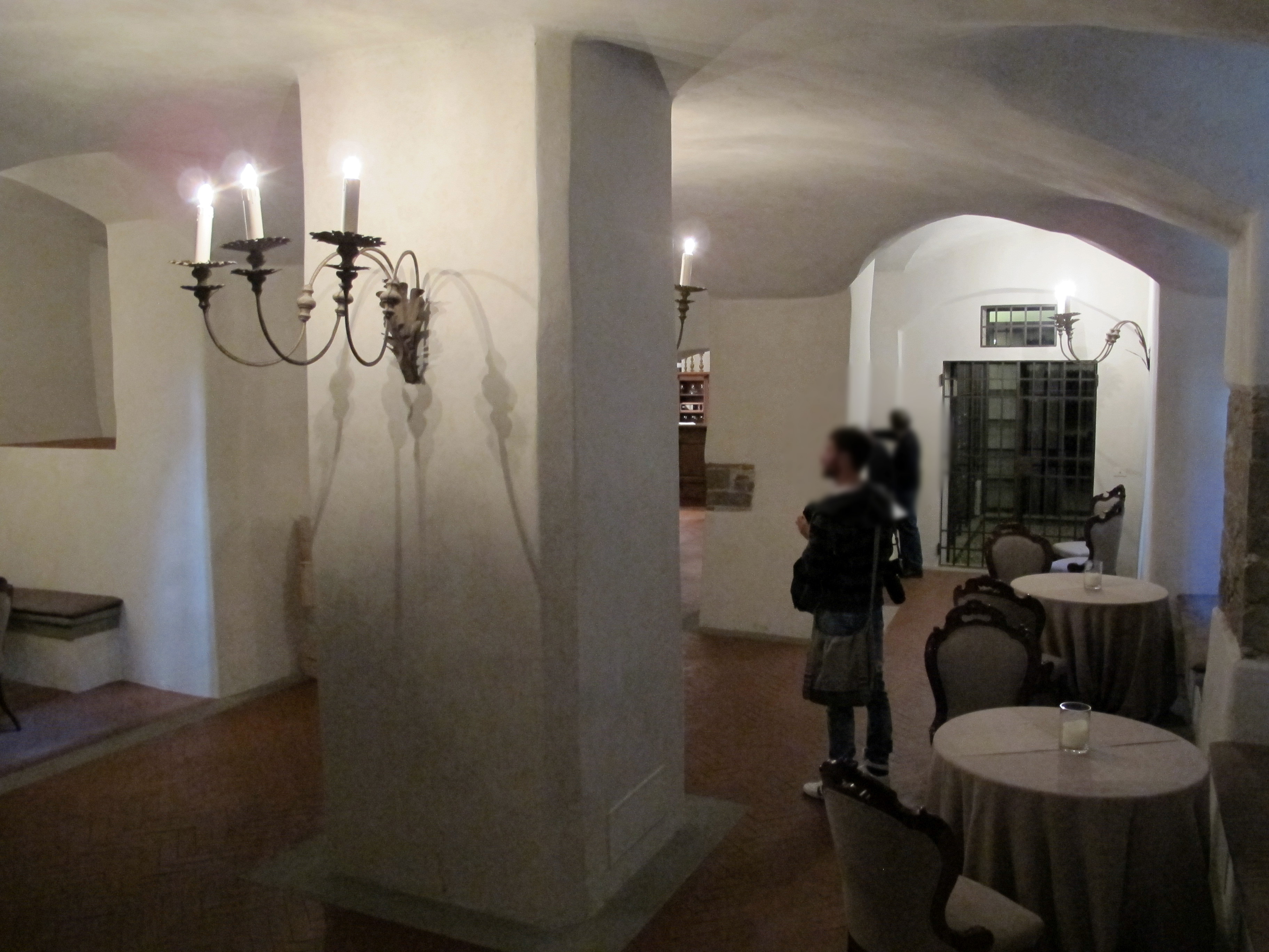 Palazzo gondi, cantine